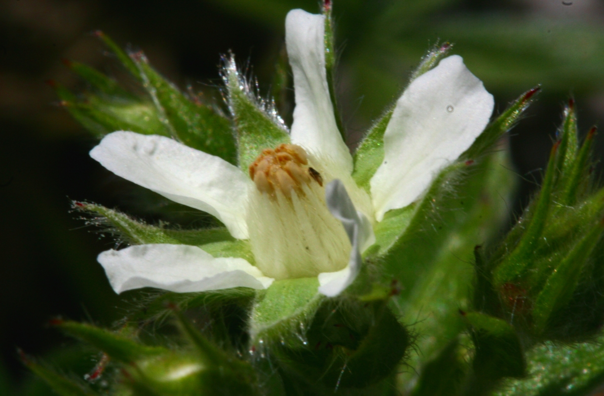 Potentilla_caulescens (Cinquefoglia penzola) Giardino Alpino Antonio Segni (loc. Rifugio Vazzoler) Taibon Agordino (BL), quota 1714 m s.l.m.